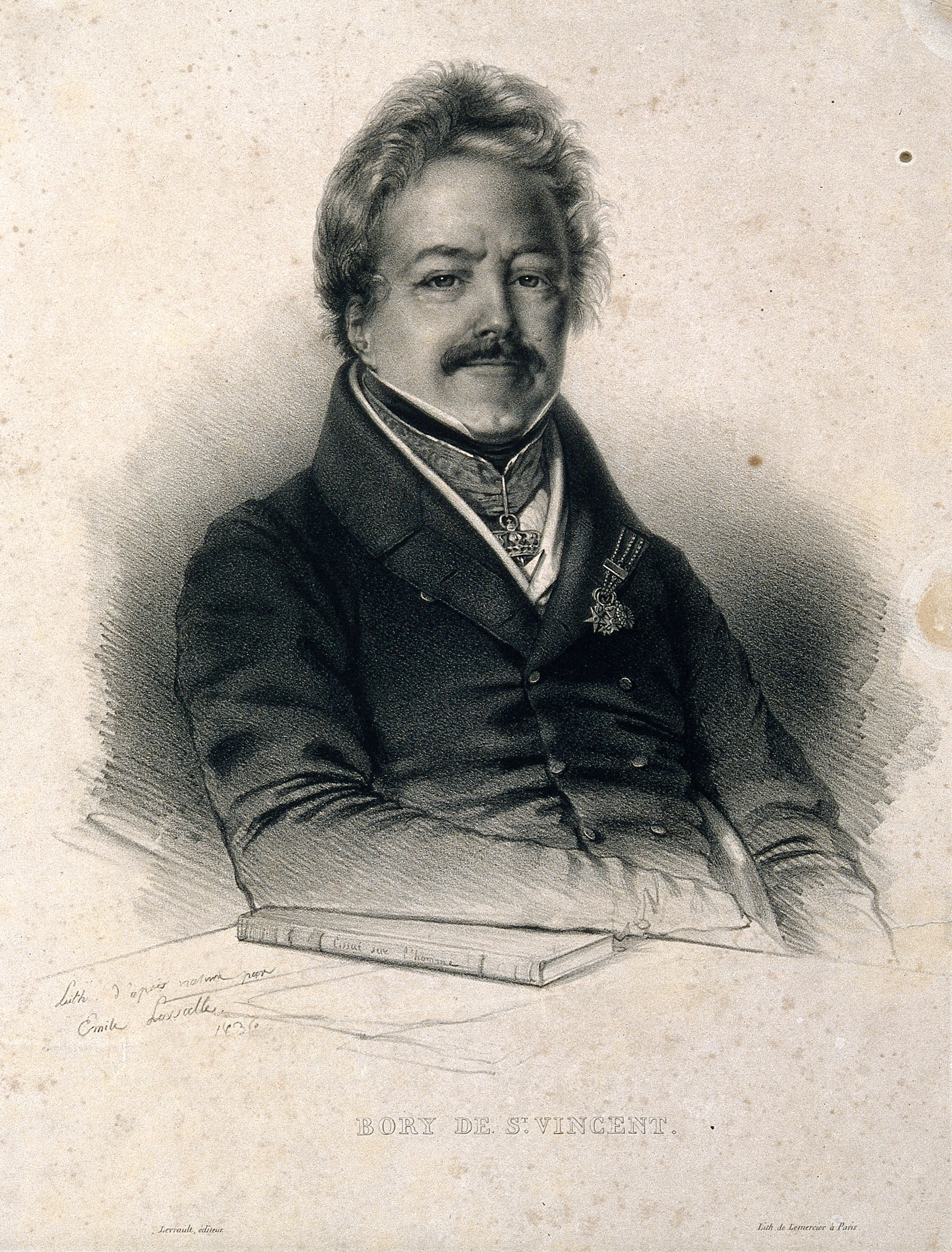 Genre/Technique: Portrait prints. Lithographs. Subject name: Bory de Saint-Vincent, M. (Jean Baptiste Geneviève Marcellin), 1778-1846.